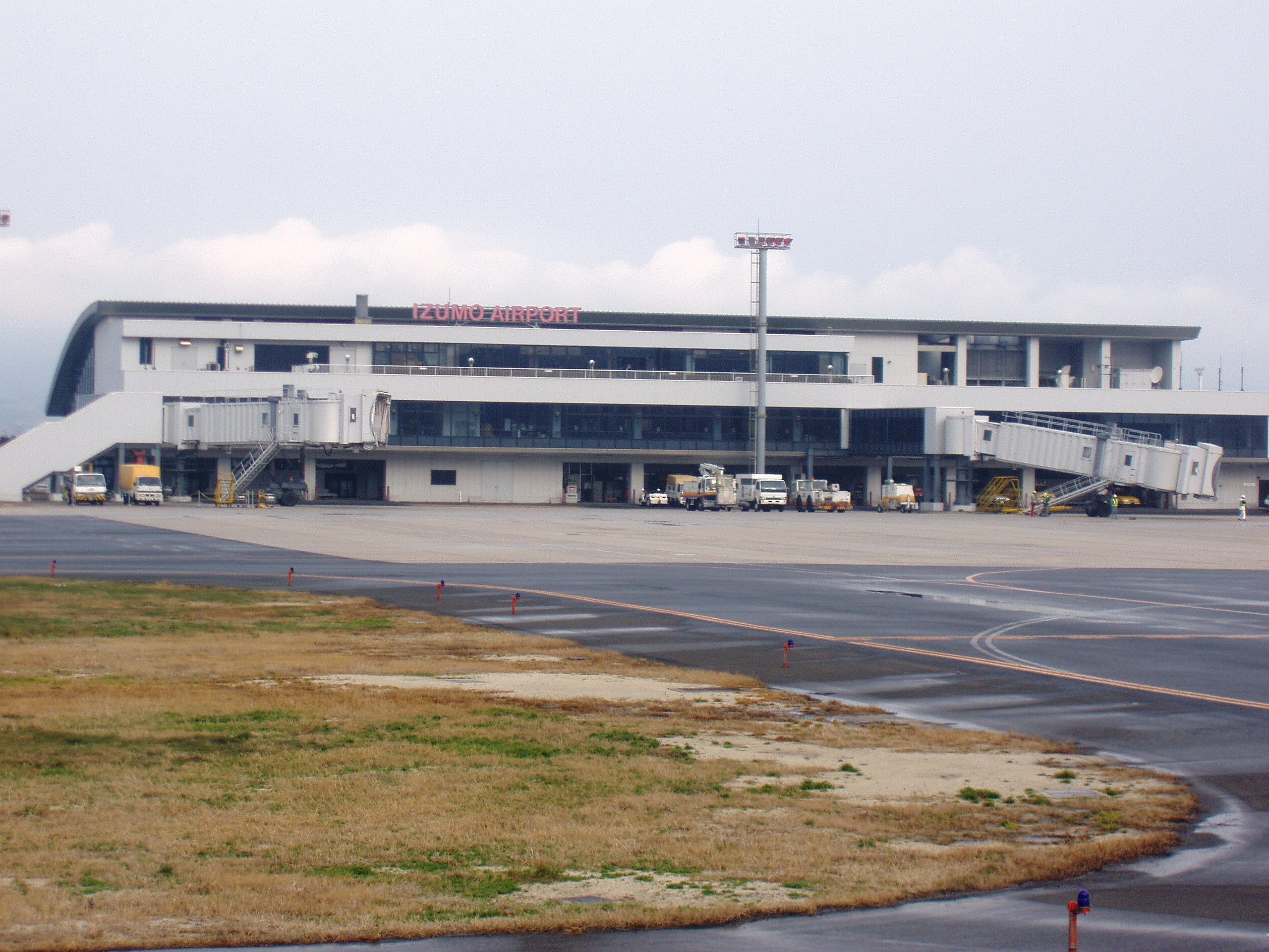 撮影日：2006年2月6日 撮影地：出雲空港 撮影者：アップロード者本人